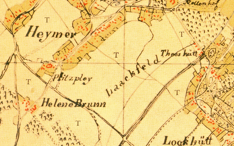 Topografische opname van't Rijnland door Tranchot en von Müffling, blad 42 (Viersen), uittreksel met het gebied van de plaatsen "Heimer", "Helenabrunn" en "Lockhütte".